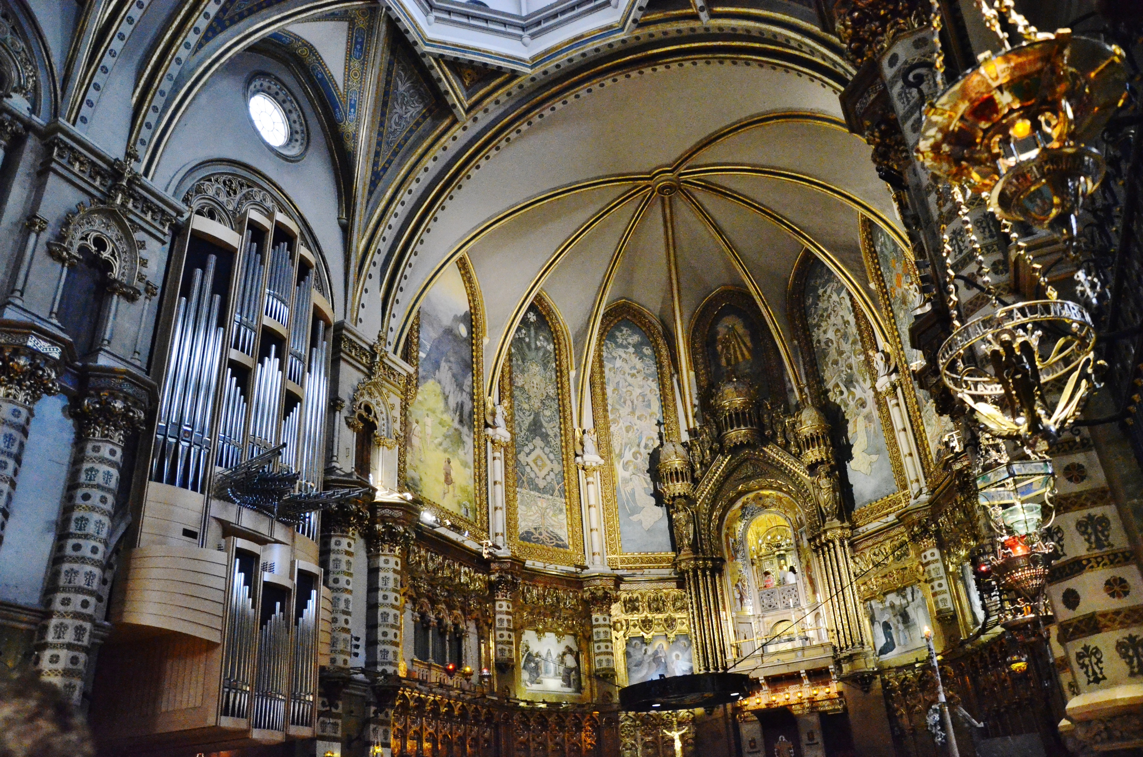 Monestir de Santa Maria de Montserrat (Monistrol de Montserrat)